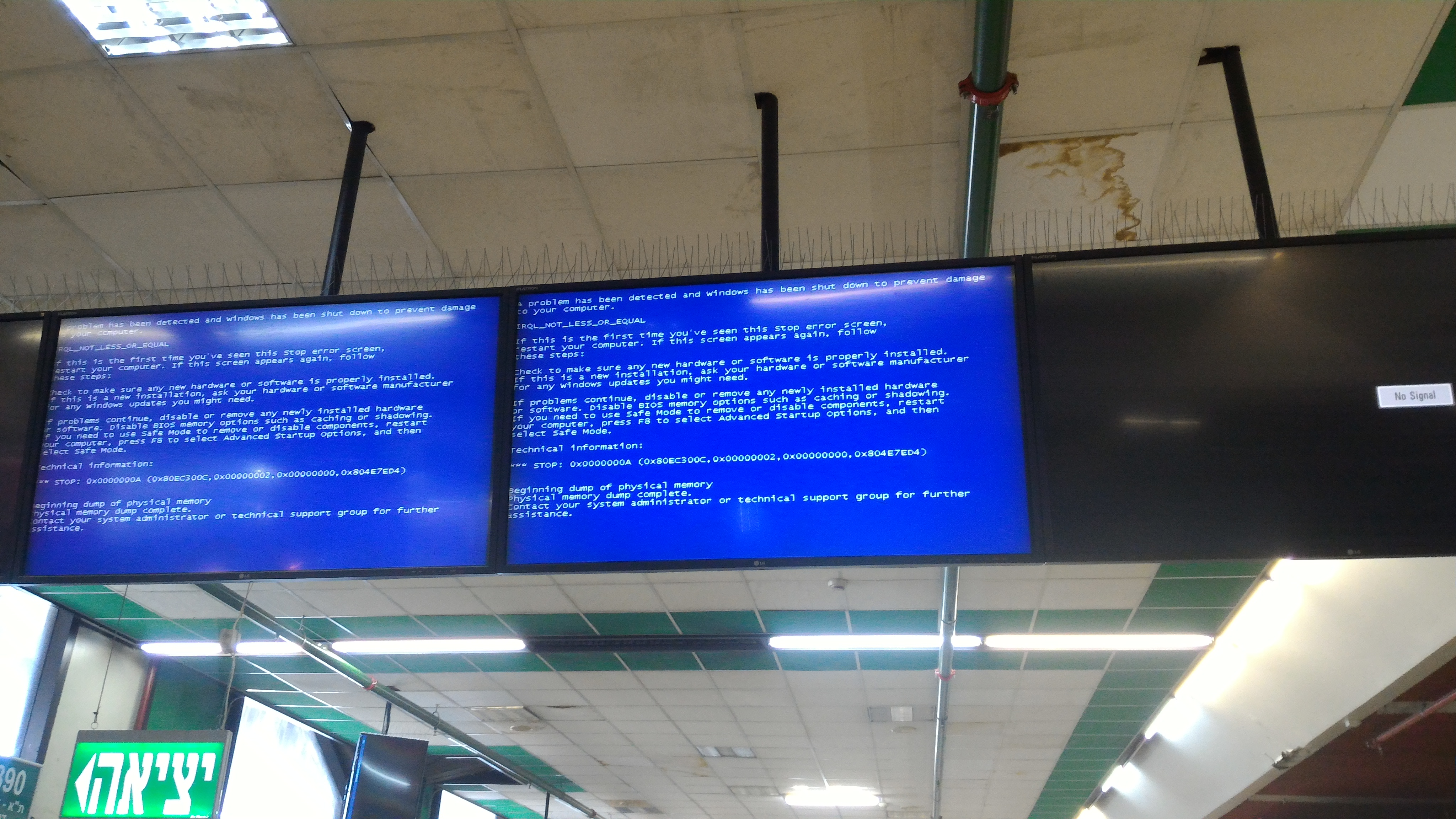 התמונה הזו מציגה תקלה במסכים איתם הנוסעים אמורים להתעדכן על זמני יציאת אוטובוסים ברציפים של התחנה המרכזית החדשה בתל אביב.